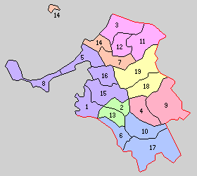 福岡県糟屋郡の町村制時点の町村。